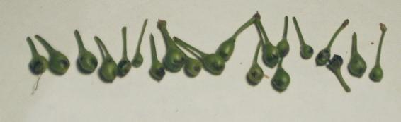 Vom Pflaumenwickler befallene grüne Früchte (Pflaumen); an allen Früchten sind dunkle Verfärbungen erkennbar; an einigen Früchten sind auch durch den Befraß der Raupe Löcher vorhanden